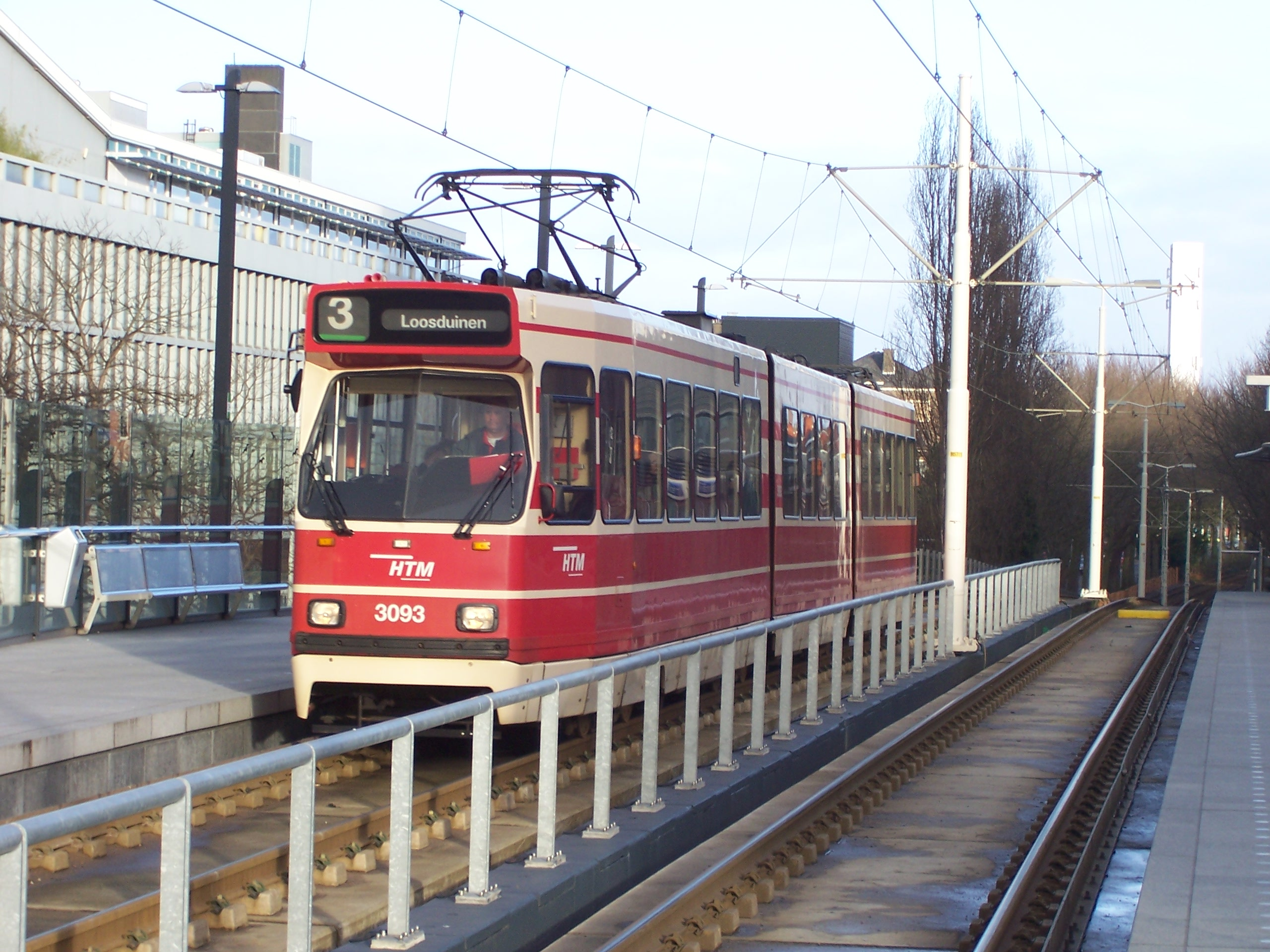 Publicatie met naamsvermelding Maurits Vink